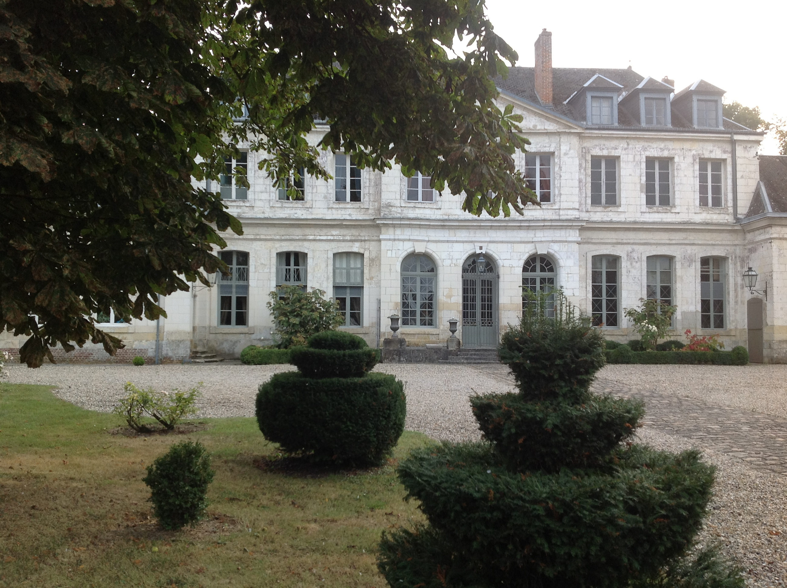 Château de Guyencourt-sur-Noye (Somme, France) .